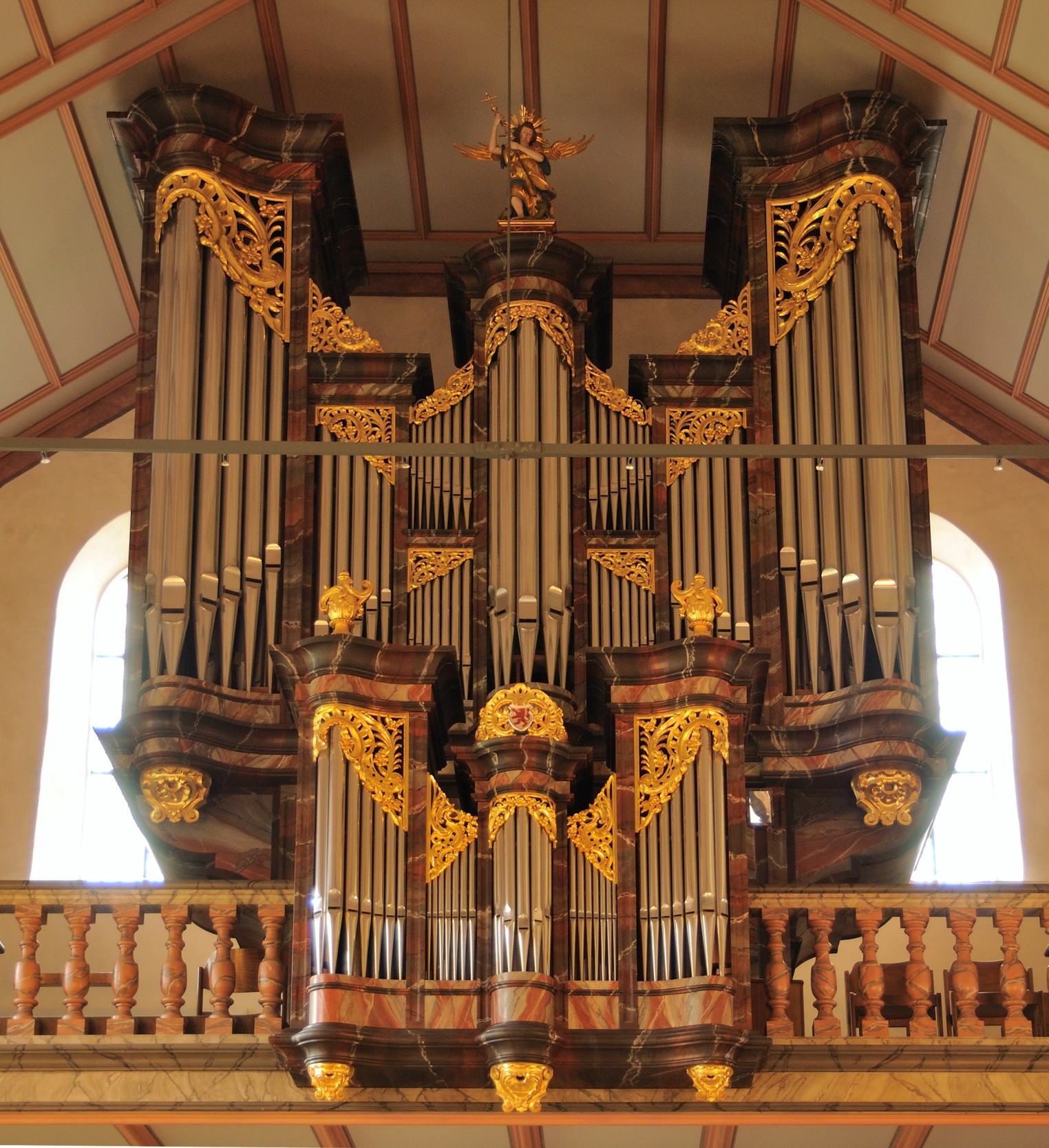 Stadtkirche Bremgarten: Orgel